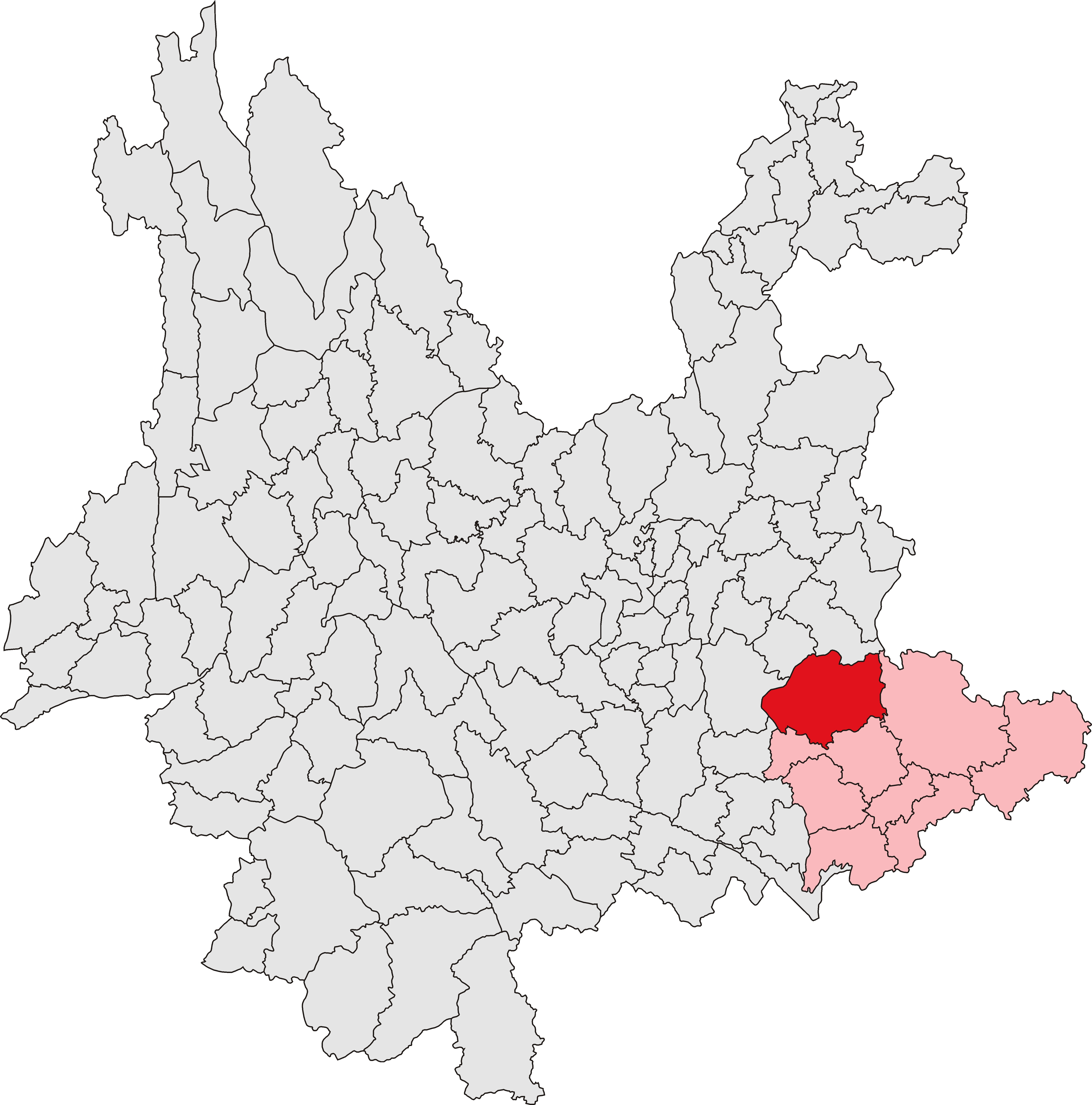 丘北县位置图